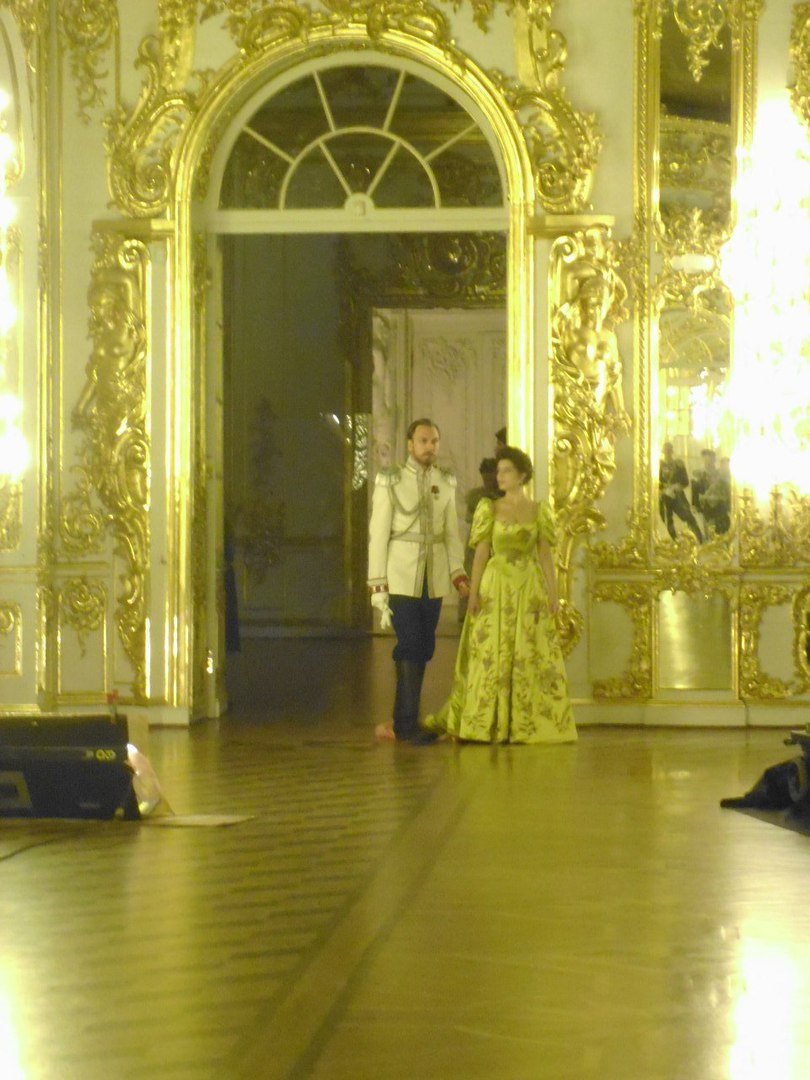 актеры фильма